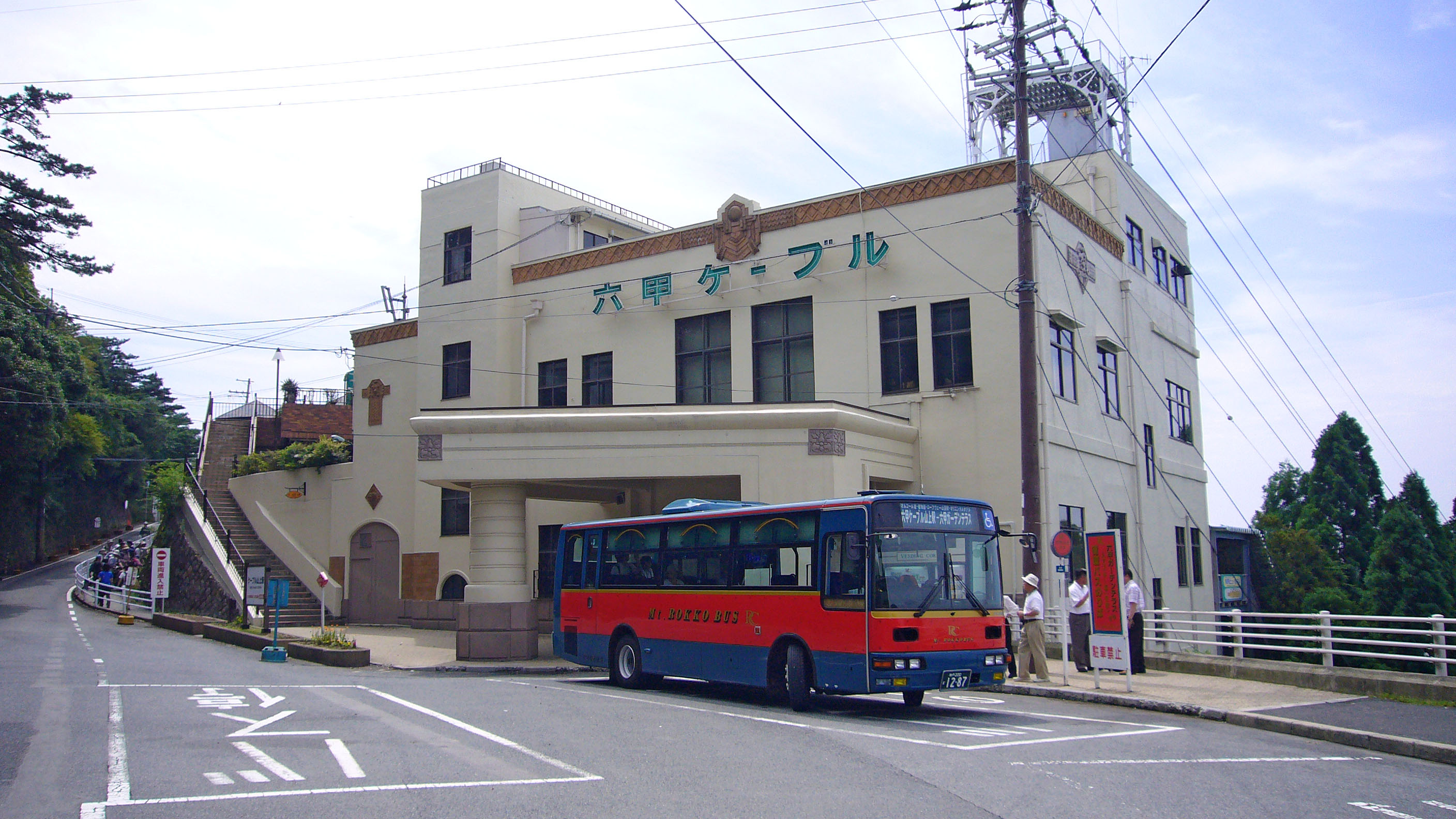 Rokko Cablecar in Kobe, Japan